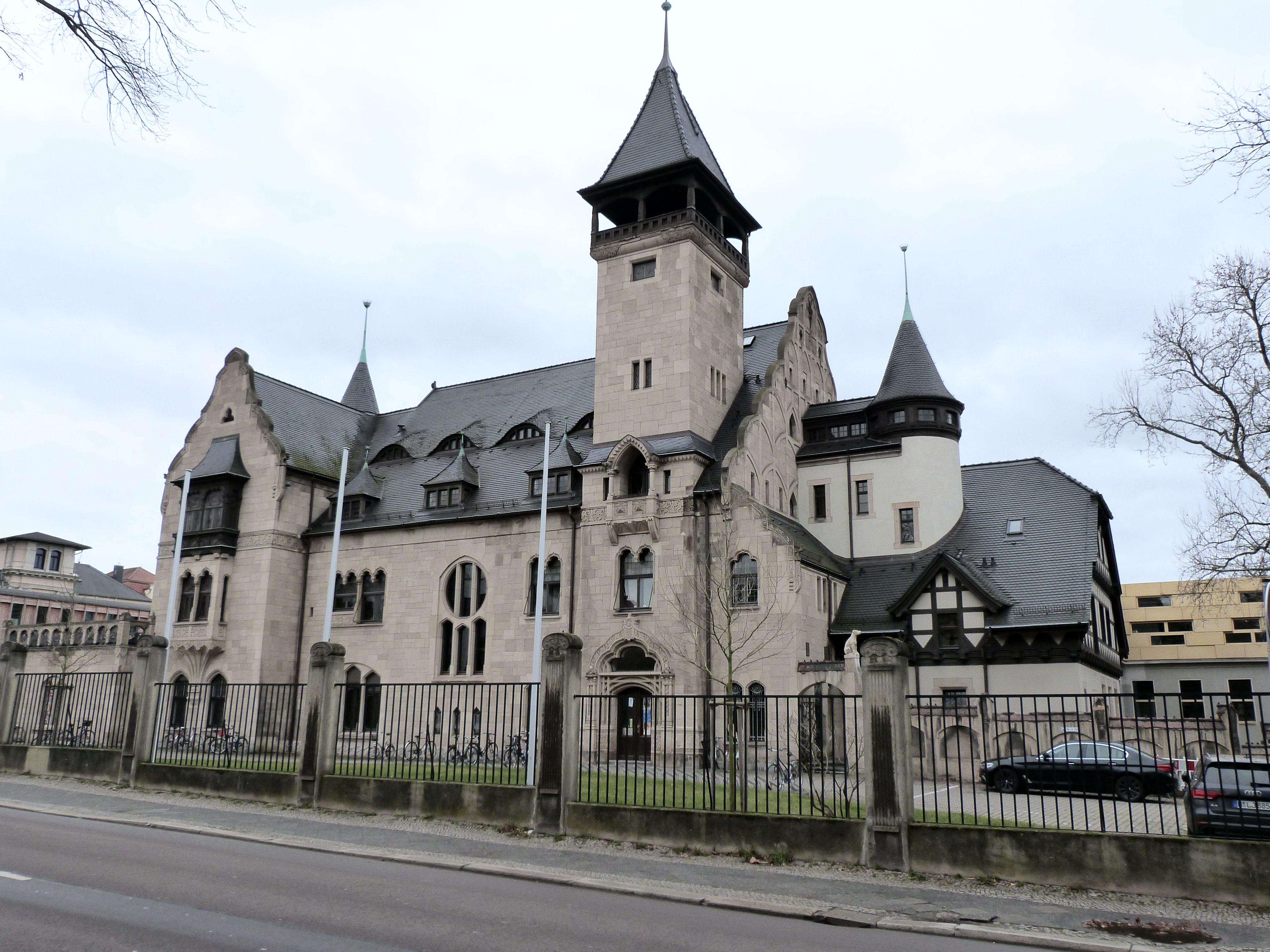 Villa Steckner, Neuwerk 7, Halle (Saale), Burg Giebichenstein Kunsthochschule, Design-Campus